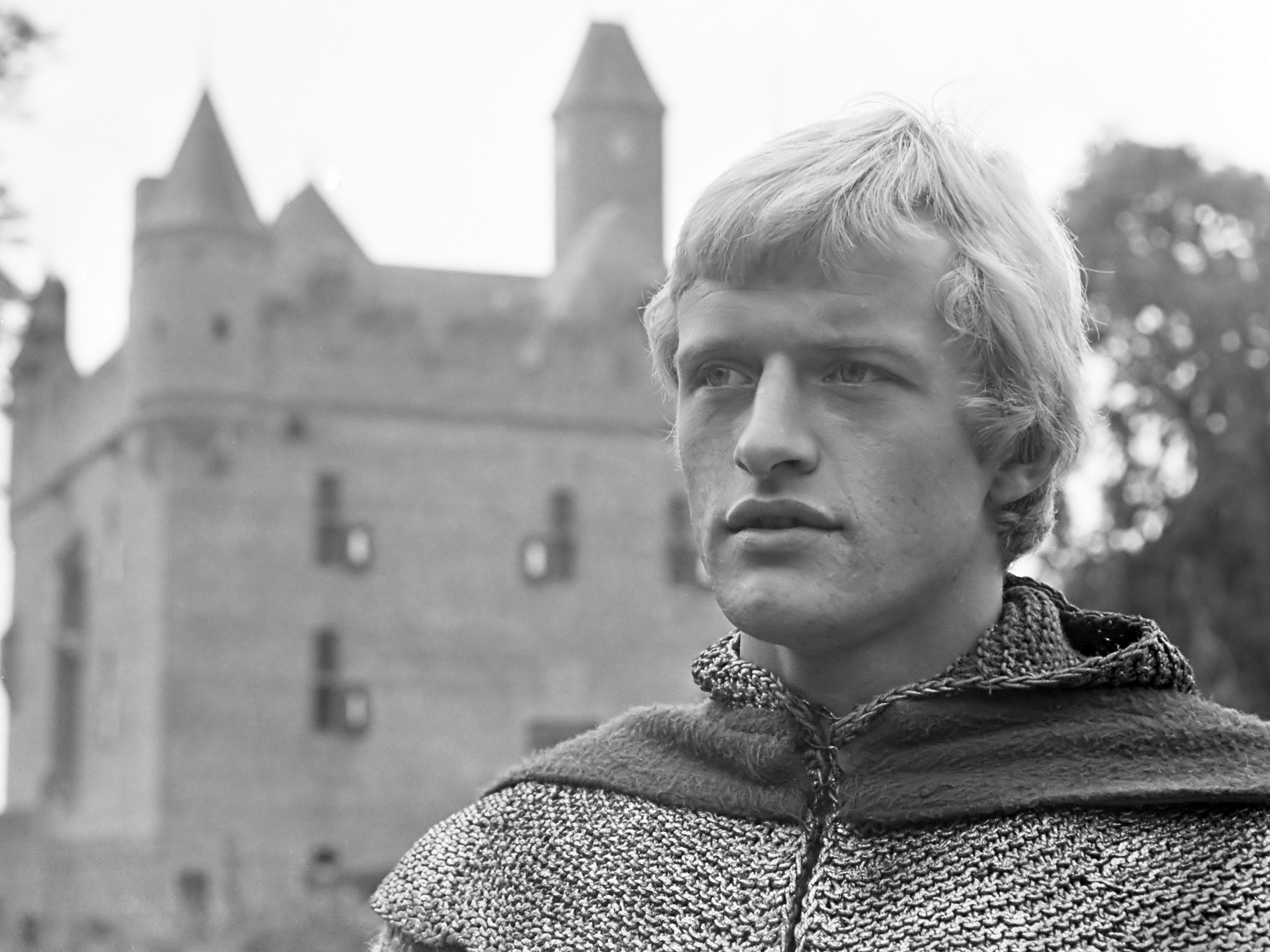 Opname van de Jeugdserie Floris door de NTS op kasteel Doornenburg in de Betuwe. De titelrol Floris van Rosemondt wordt gespeeld door Rutger Hauer 19 september 1968